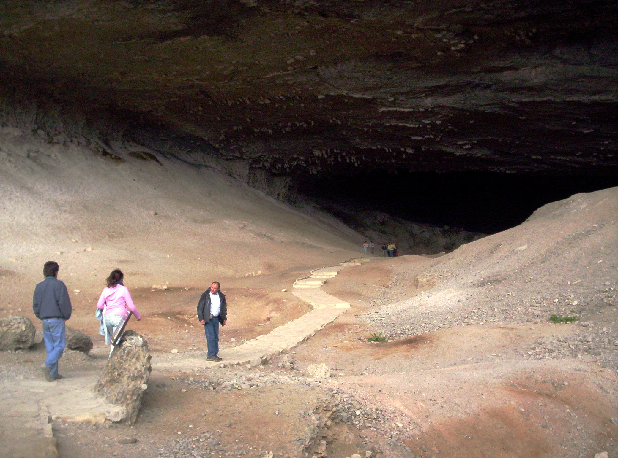 Foto tomada hacia el interior de la cueva.